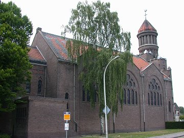 Zelf gemaakt, GNU Categorie:Afbeelding Waalwijk